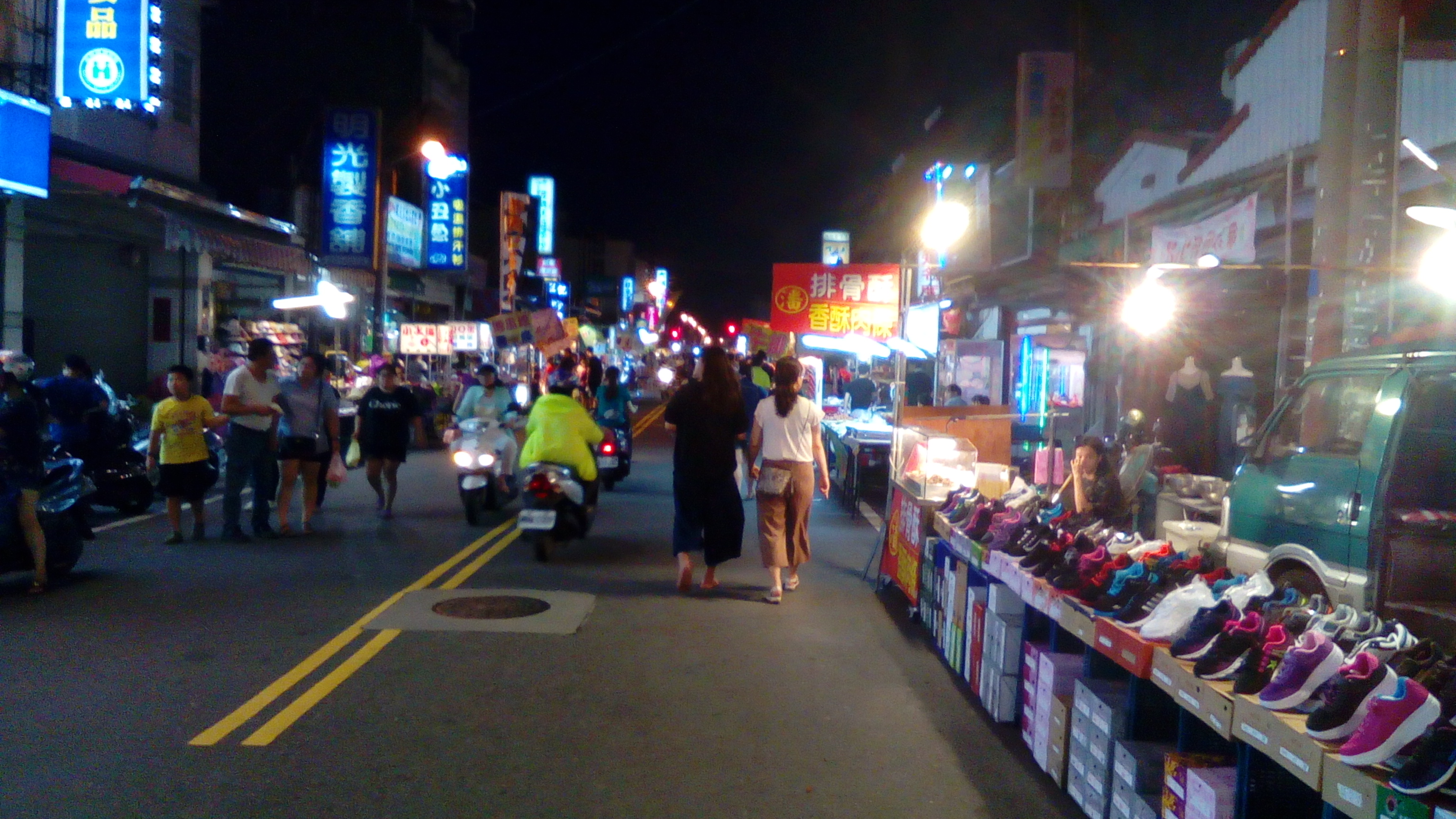 東港夜市行人徒步區